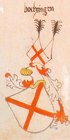 Ingeram-Codex der ehemaligen Bibliothek Cotta bochingen freigestellt aus